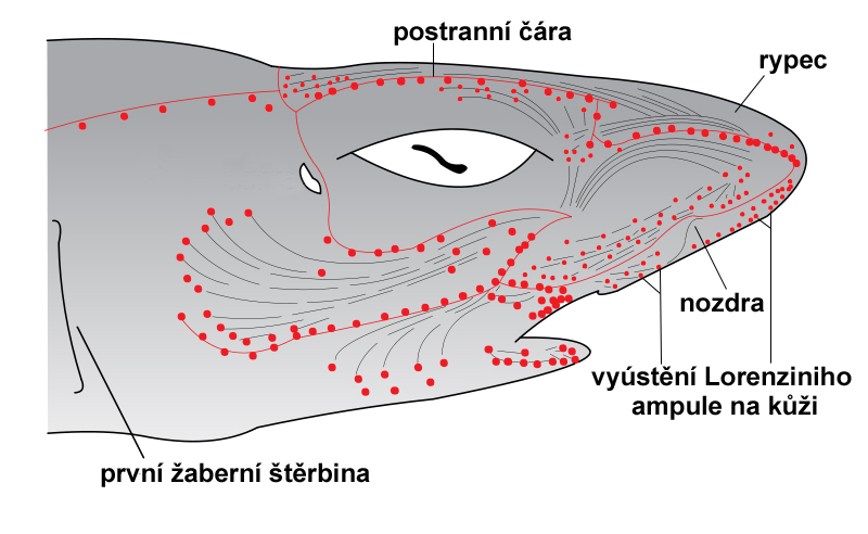 Lorenziniho ampule a větvení postranní čáry u žraloků